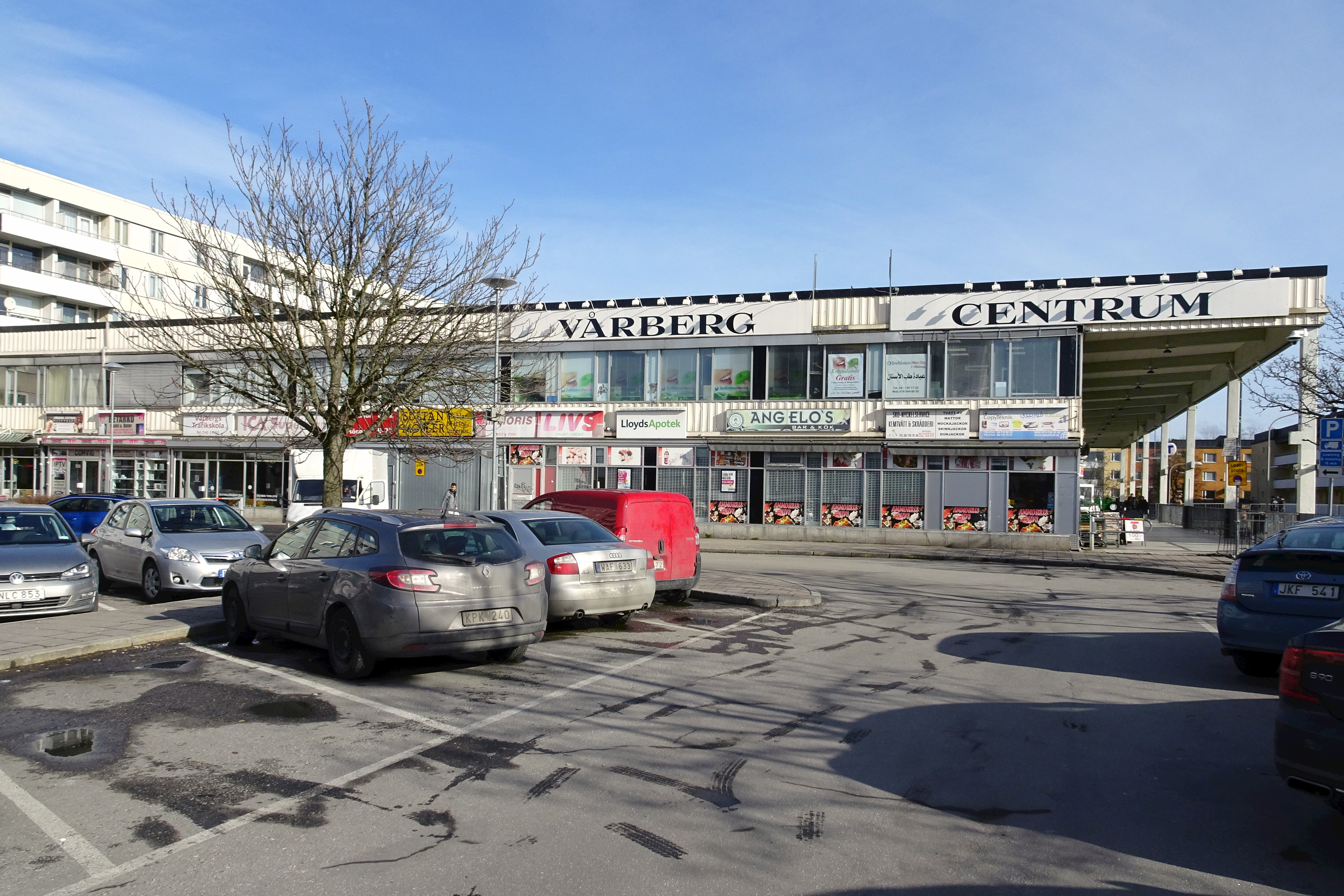 Vårberg centrum, invigd i september 1968, arkitekt Hack Kampmann